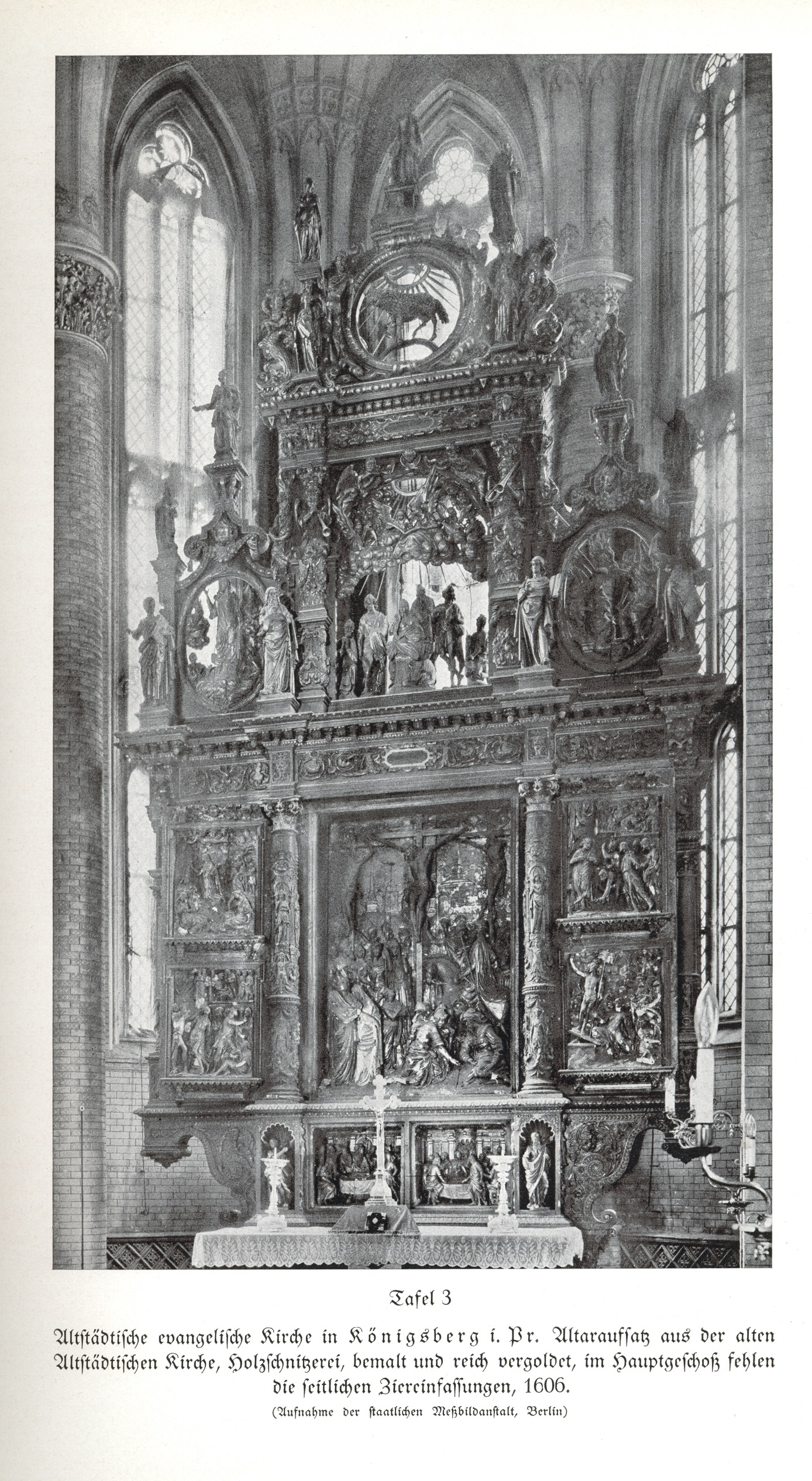 Königsberg, Altstädtische Kirche, Altaraufsatz, 1606